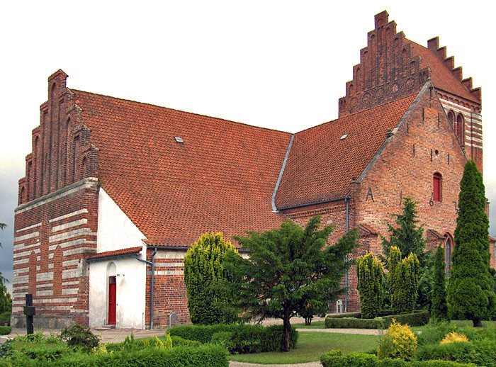 fra nordøst